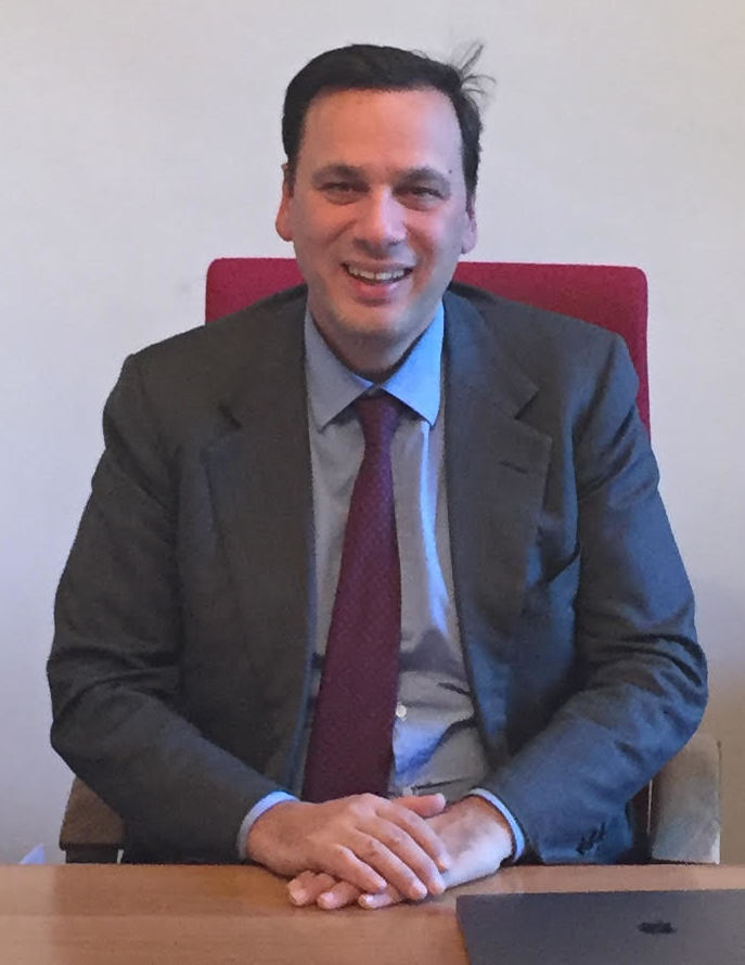 Andrea Monda nel suo ufficio